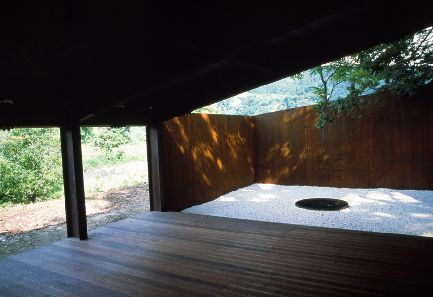 Casagrande & Rintala: Potemkin, Echigo-Tsumari, Japan, 2003